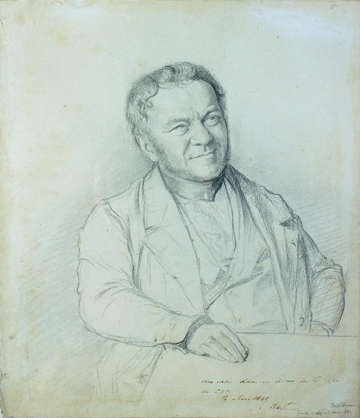 Ritratto di Stendhal, disegno, Musée Stendhal, Grenoble